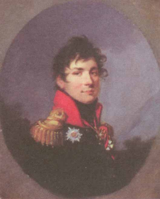 Граф Михаил Семёнович Воронцов (1782-1856)